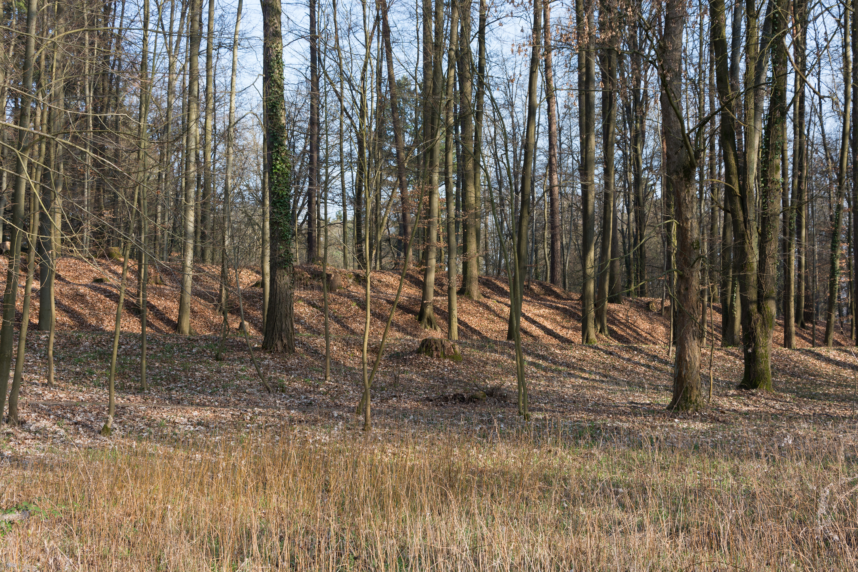 Reste der ehemaligen Erdwerke im nördlichen Vorfeld der Festung Rosenberg in Kronach.